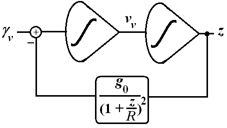 Ænglisc: IRS Vertical axis